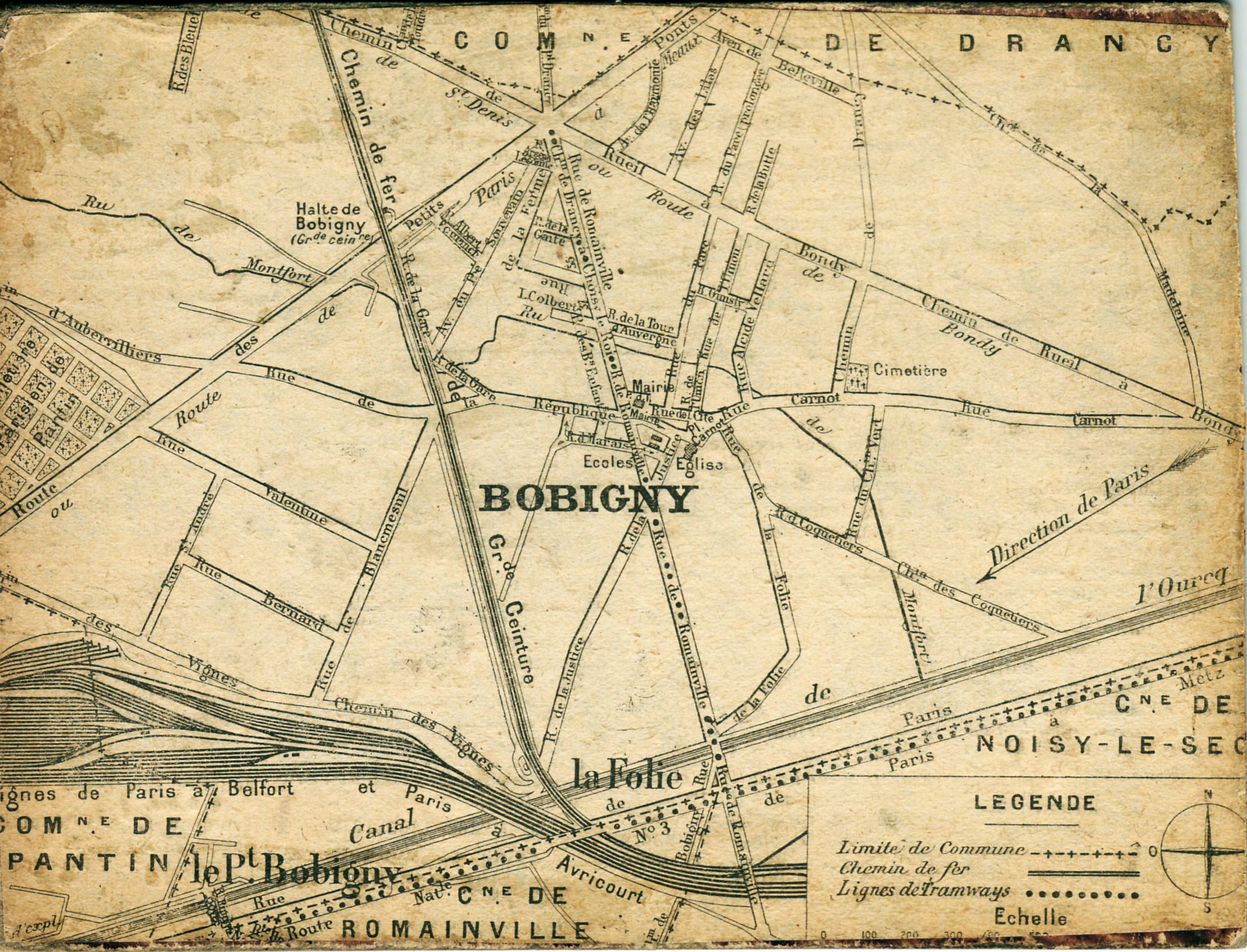 Plan dit "de livreur" de Bobigny (début du XXe siècle, carton imprimé, sans mention d'éditeur)